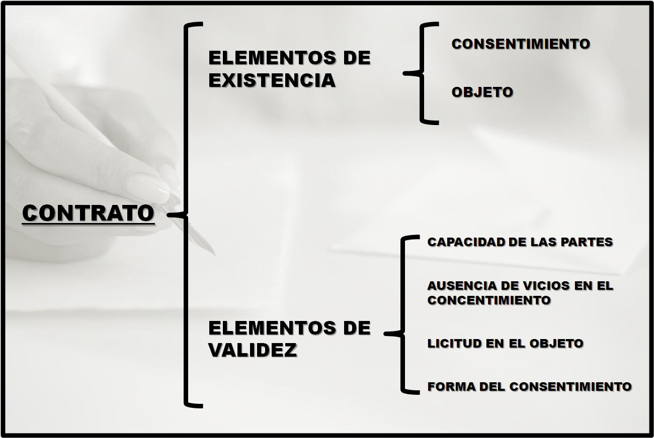 MAPA CONCEPTUAL ELEMENTOS DE EXISTENCIA Y VALIDEZ DE LOS CONTRATOS.